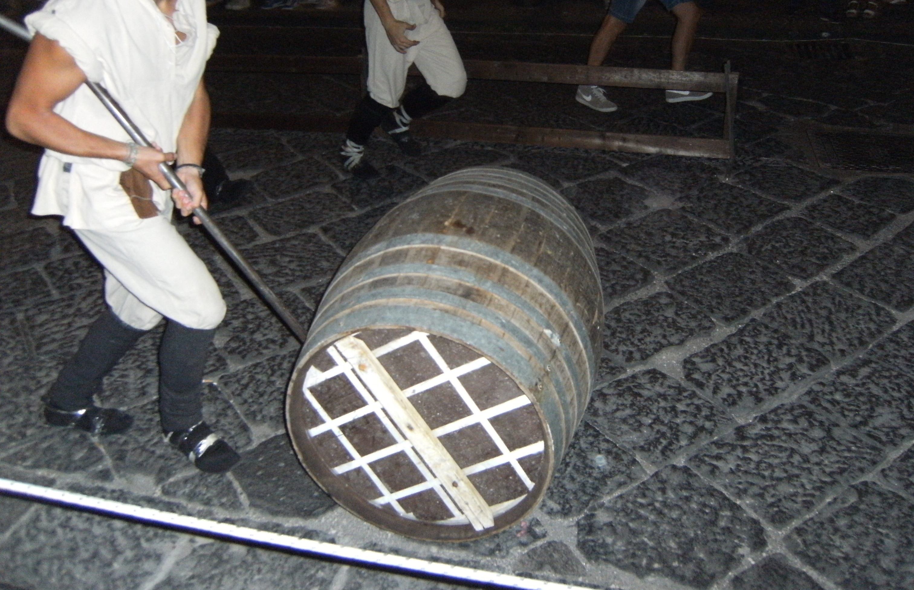 Palio della Botte di Avellino 12 agosto 2014